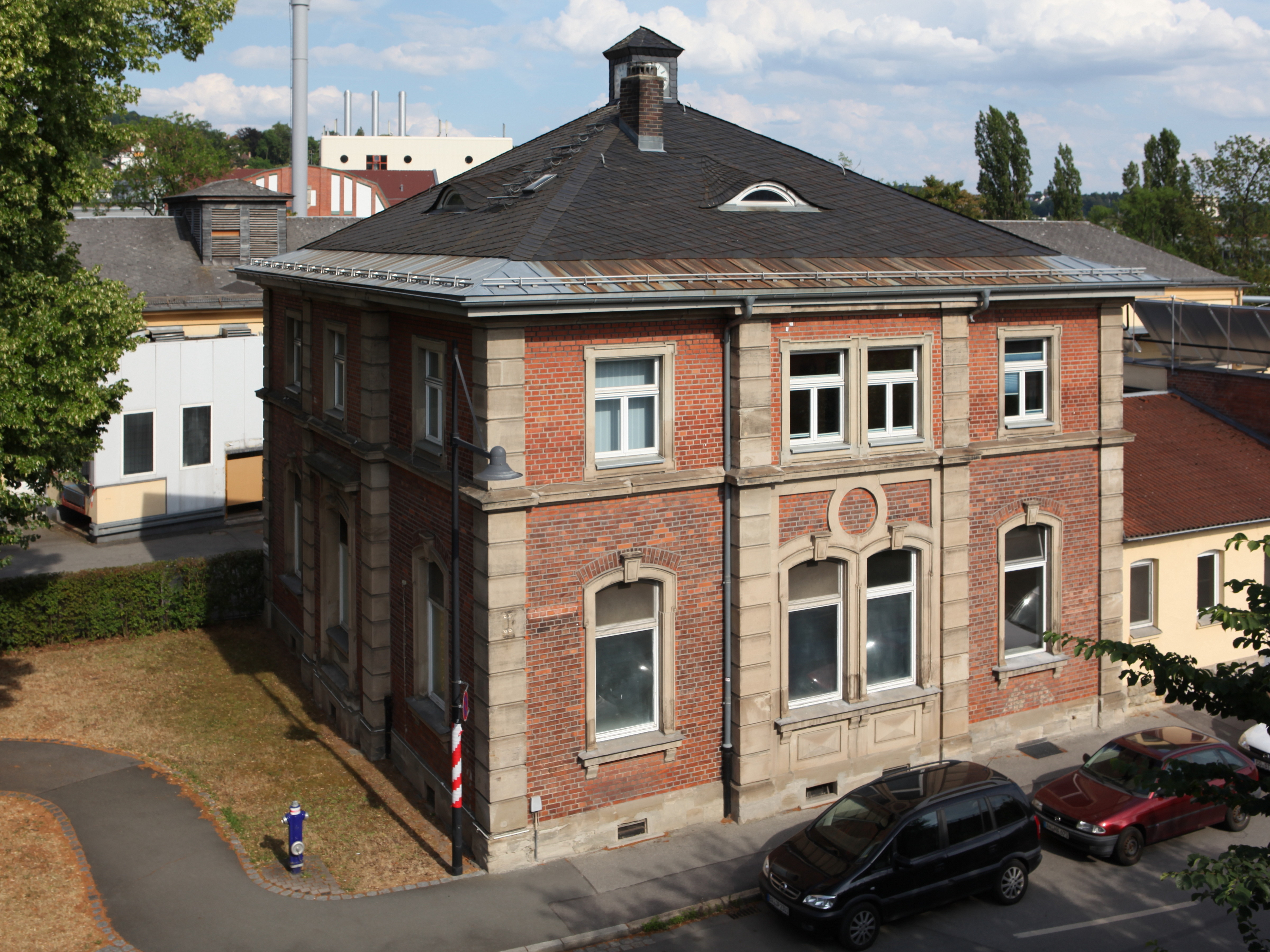 Schlachthof Coburg, Verwaltungsgebäude